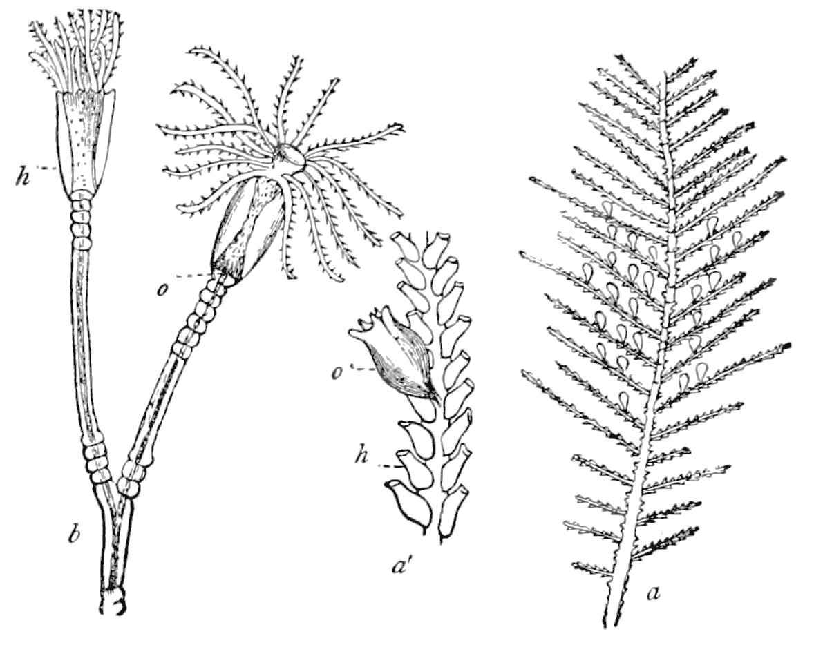 Kirchenpaueria pinnata syn. Sertularia pinnata